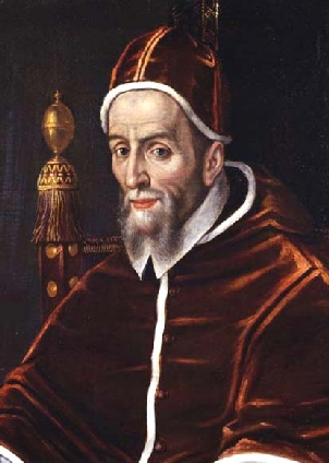 Pope Urbanus VII